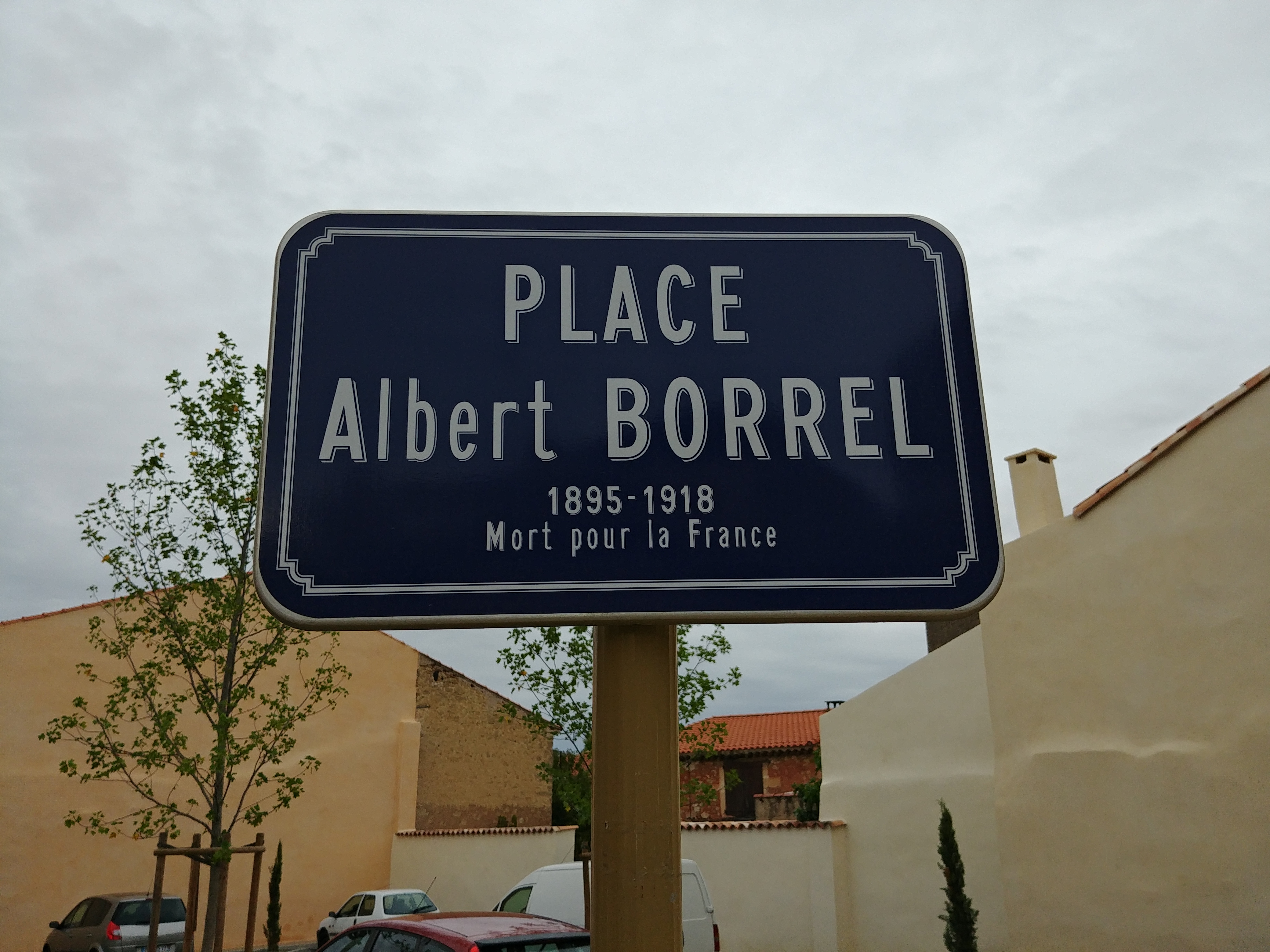 Place Albert Borrel , á Cazouls lès Béziers, nommée d'après le fils de Amédée Borrel.